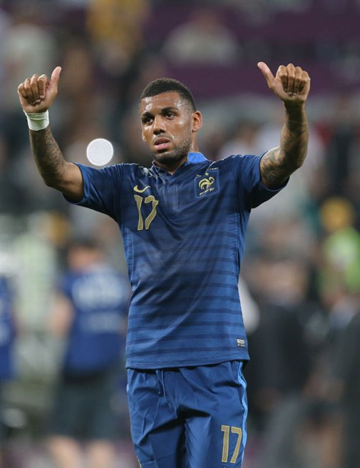 M'Vila en équipe de France lors de l'Euro 2012 contre l'Ukraine.